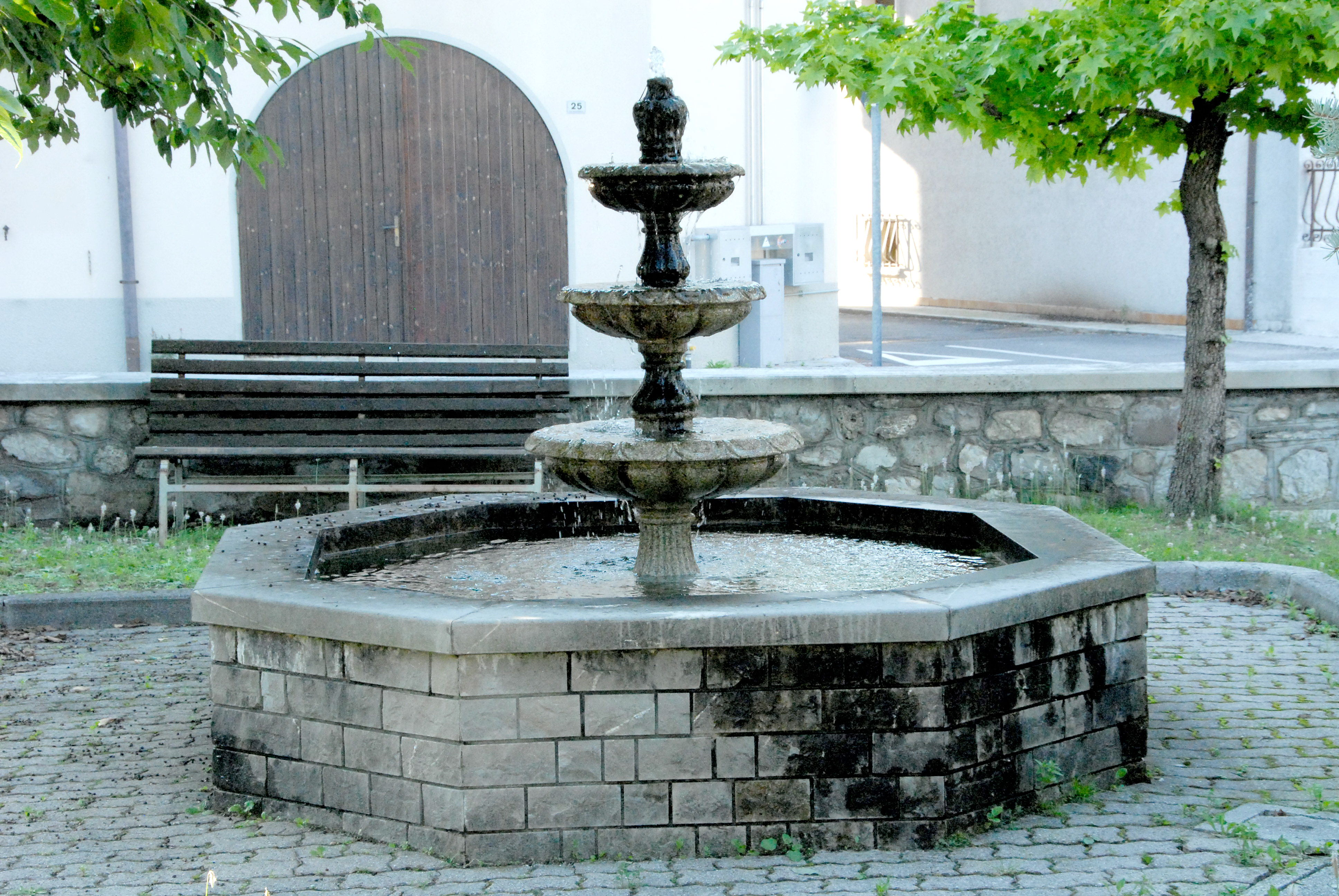 Fountain at Resiutta in Canal del Ferro, province of Udine, region of Friuli Venezia-Giulia, Italy